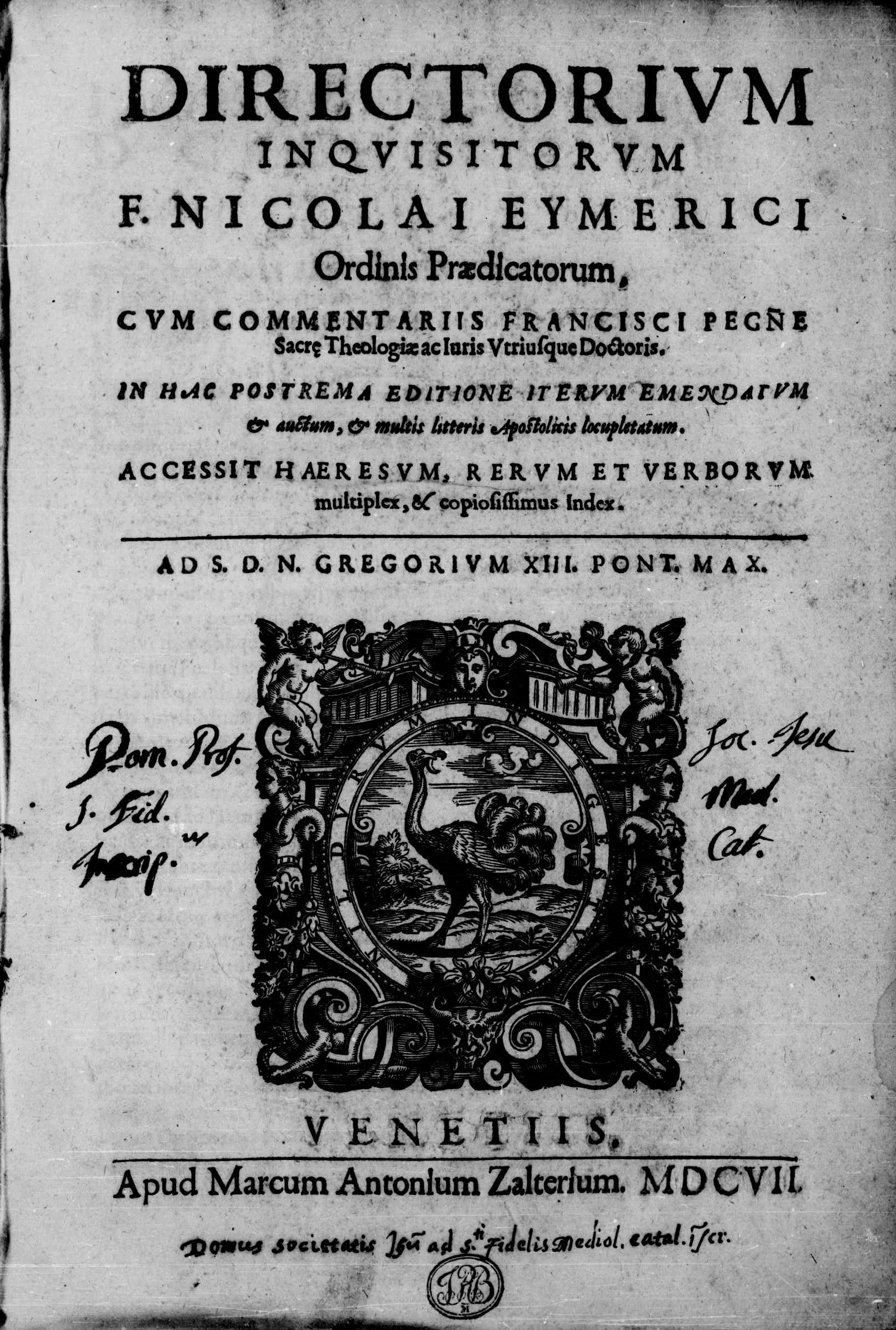 Frontespizio